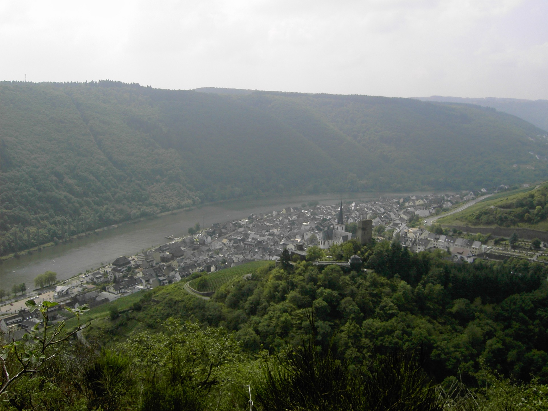 Klotten (selbst fotografiert / gemeinfrei)